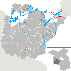 Kleinmachnow in Brandenburg (Country) - District Potsdam-Mittelmark